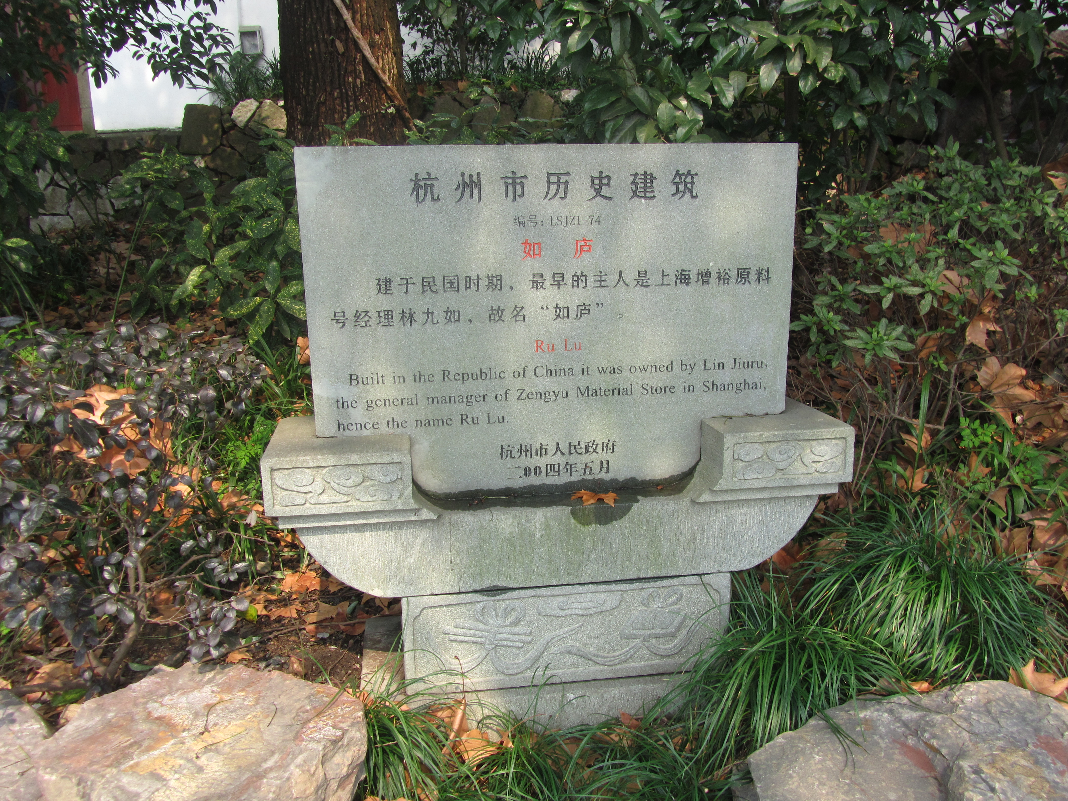 如庐，杭州市历史建筑，保护碑。